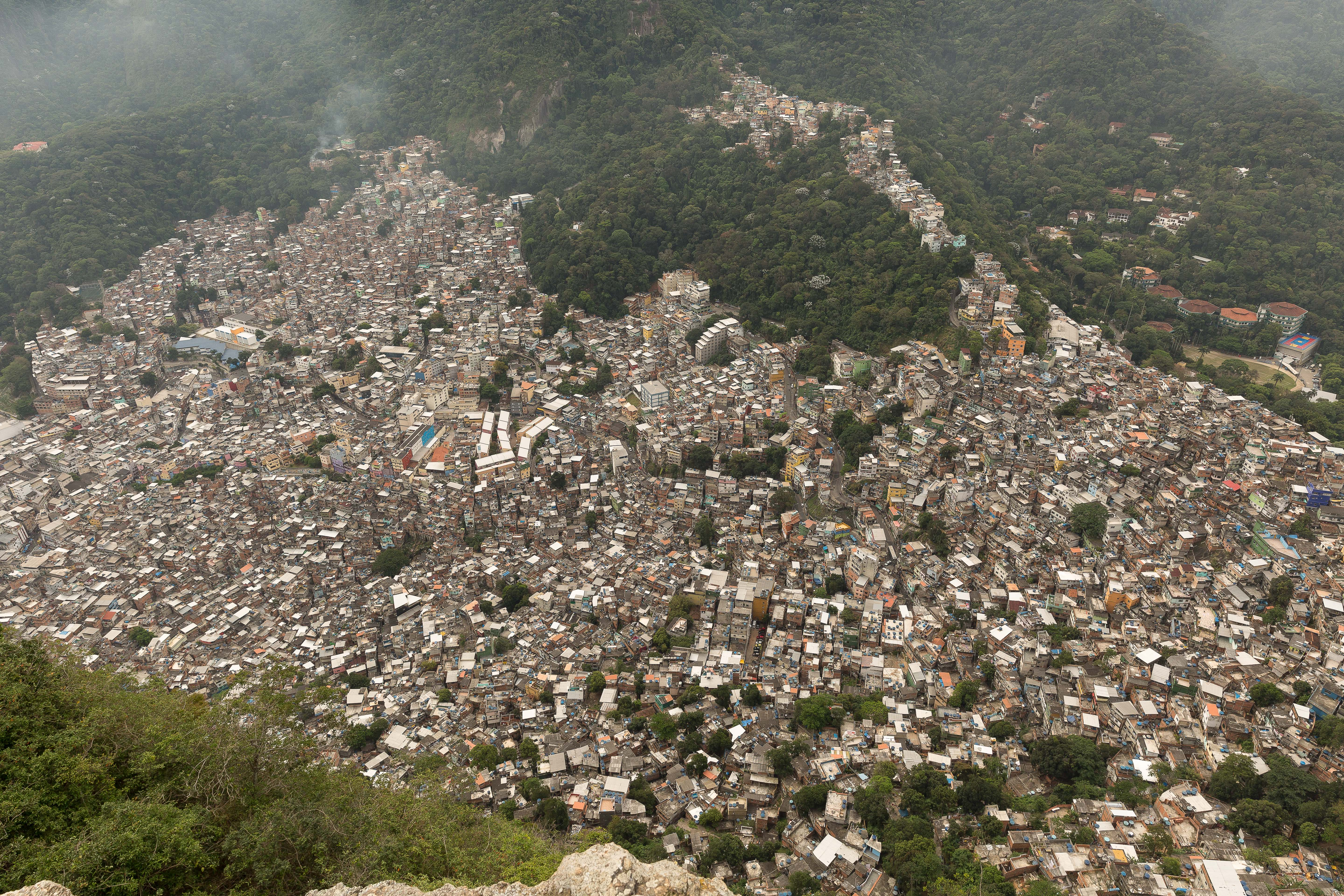 Vista aérea da favela da Rocinha, localizada na cidade do Rio de Janeiro.